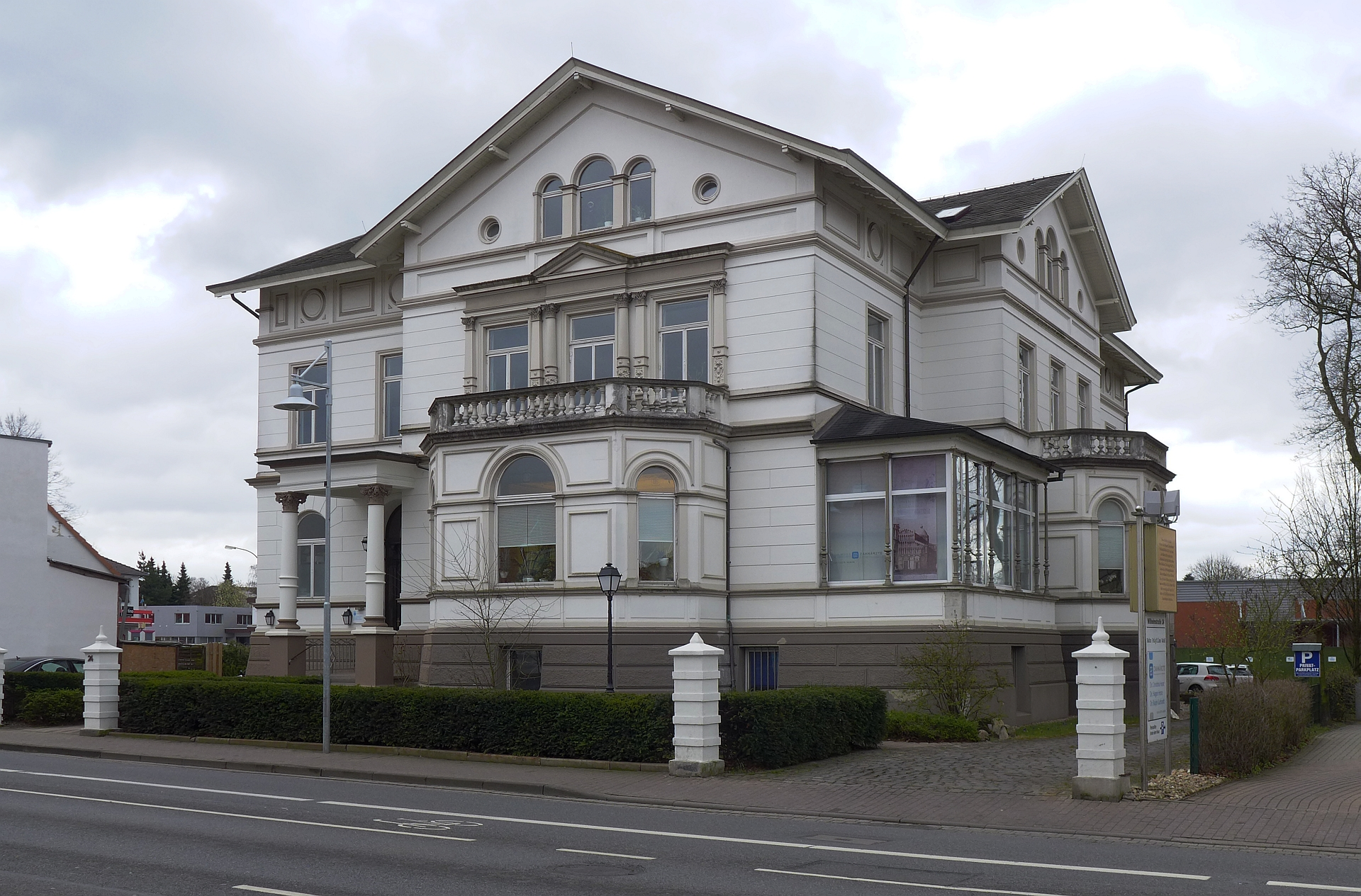 Gründerzeitvilla in der Wilhelmstraße 24 von Soltau, ein Baudenkmal. Ehemals Wohnstatt des Fabrikanten C. Röders. Das Innere der Villa ist ausgestaltet mit Elementen der Gründerzeit sowie des Jugendstils.